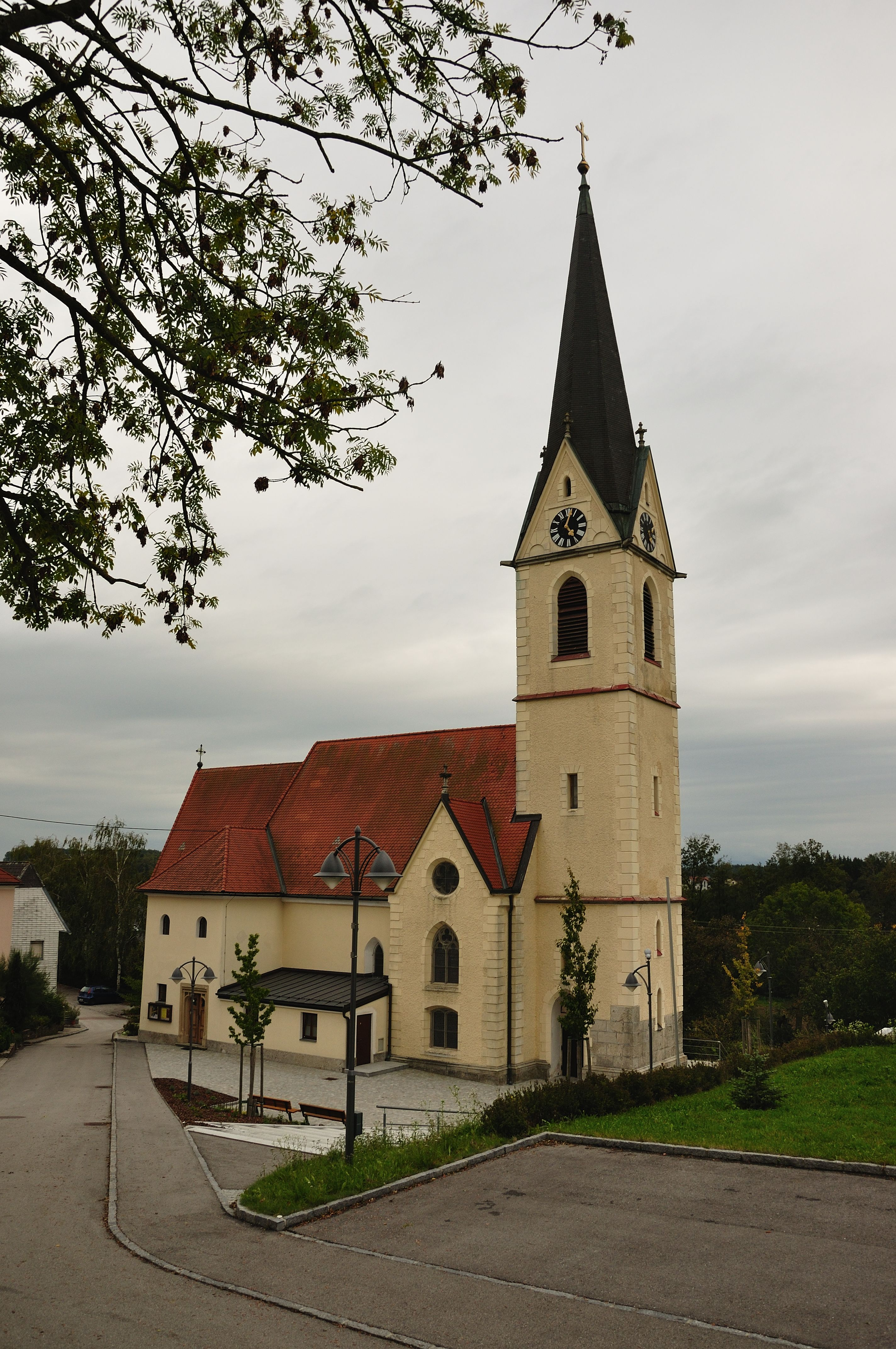 Kath. Pfarrkirche hl. Georg und ehem. Friedhof. Allhaming